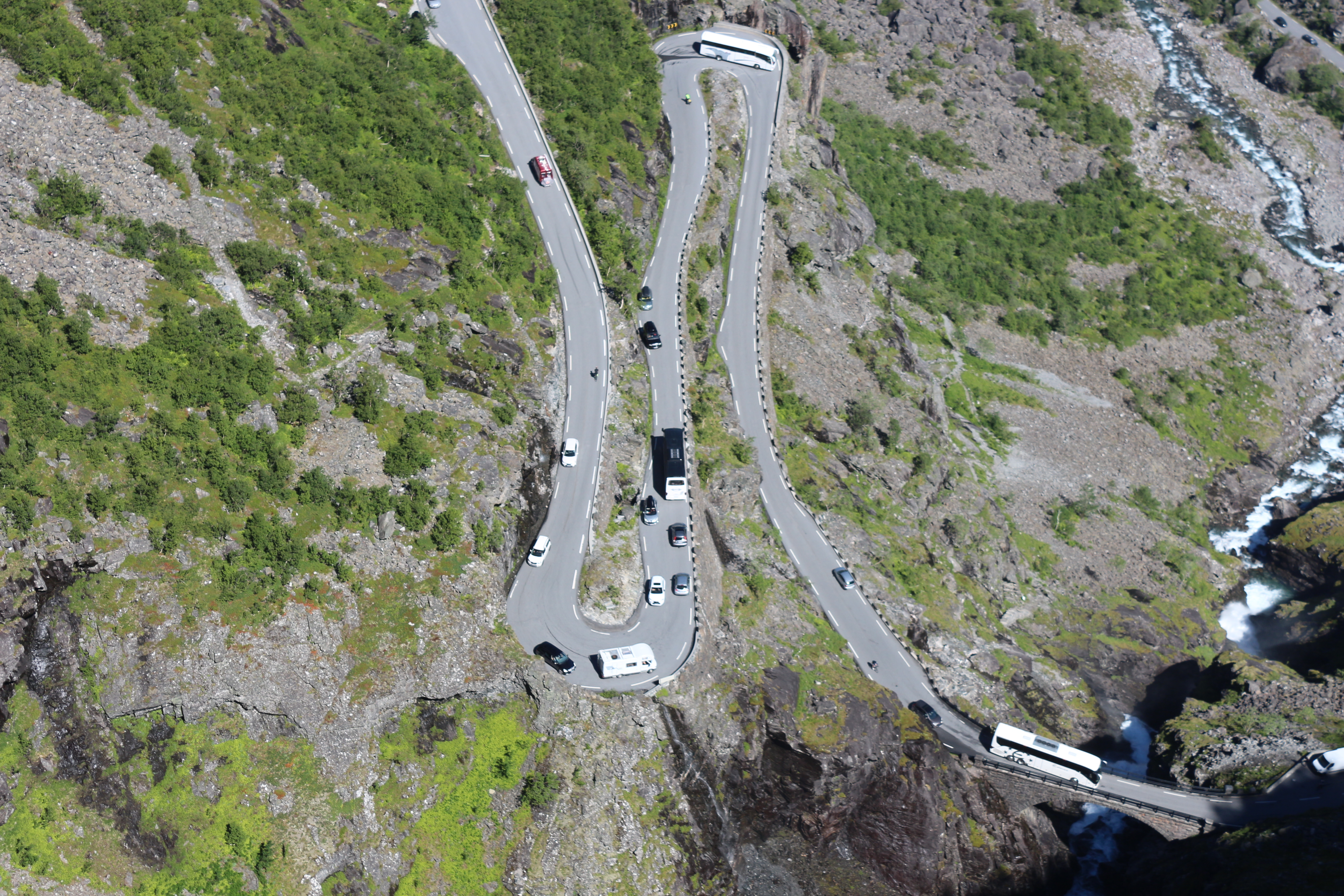 Trollstigen, Rauma kommune